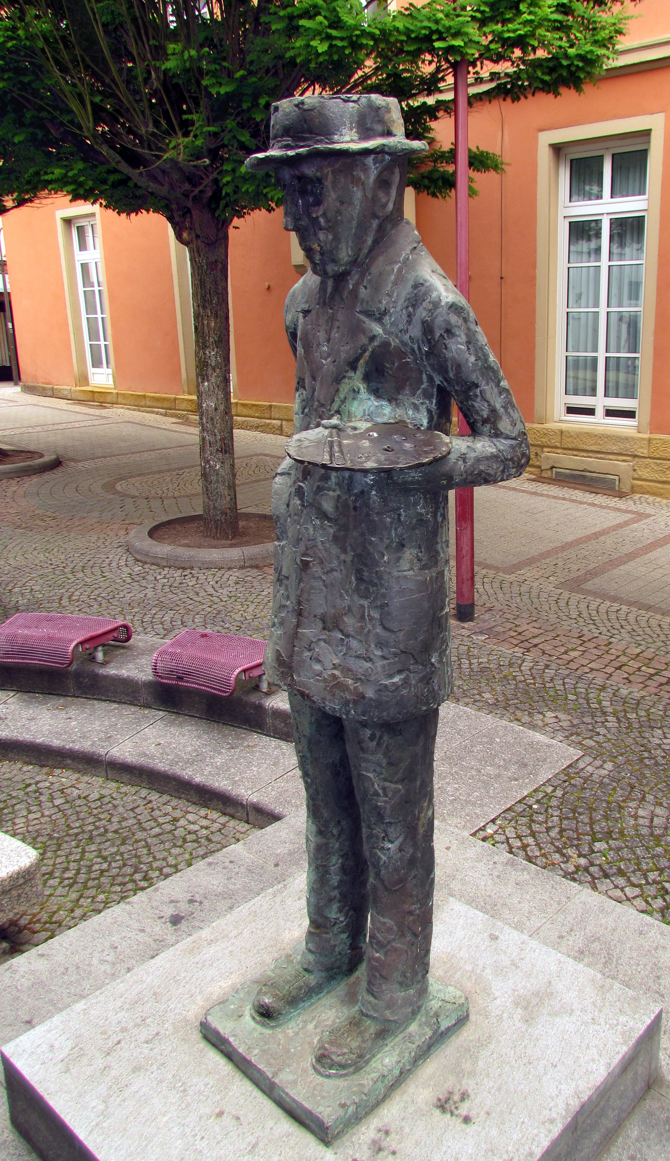 Bildinhalt: Der Maler Rudolf Wild (1871-1960) als Bronzestatue des Mainzer Bildhauers Reinhold Petermann (*1925 Boos an der Nahe) auf dem Maler-Wild-Platz in Idar. Aufnahmeort: Idar-Oberstein, Deutschland